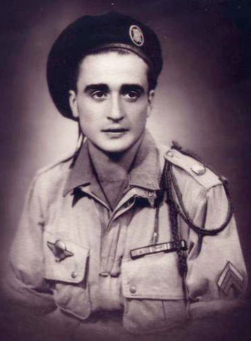 Février 1948, 1er BPC en Indochine. Le caporal chef Louis Simorre à Saigon (brevet N° 20606 obtenu le 27/6/1946). L'uniforme est une tenue de saut américaine, le chasseur porte le béret des choc et sur la patte d'épaule insigne du Choc à bordure noire (fabrication Algérie par Aravit et Pérez en 1946). Collection Henri Simorre.Autorisation de publier la photographie via le site (Cf.